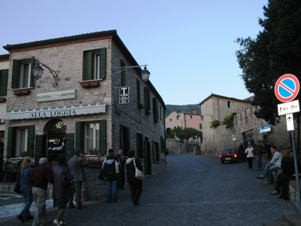 Il centro del borgo medievale di Arquà Petrarca